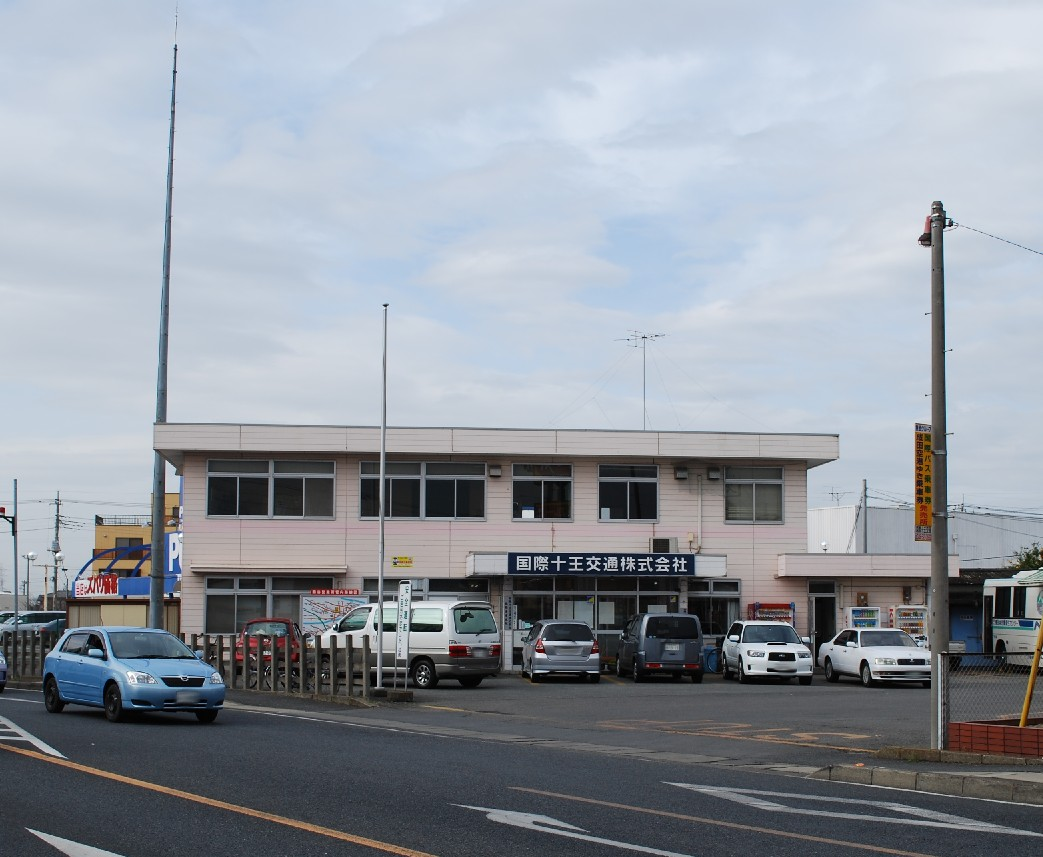 国際十王交通熊谷営業所社屋。公道上より撮影。